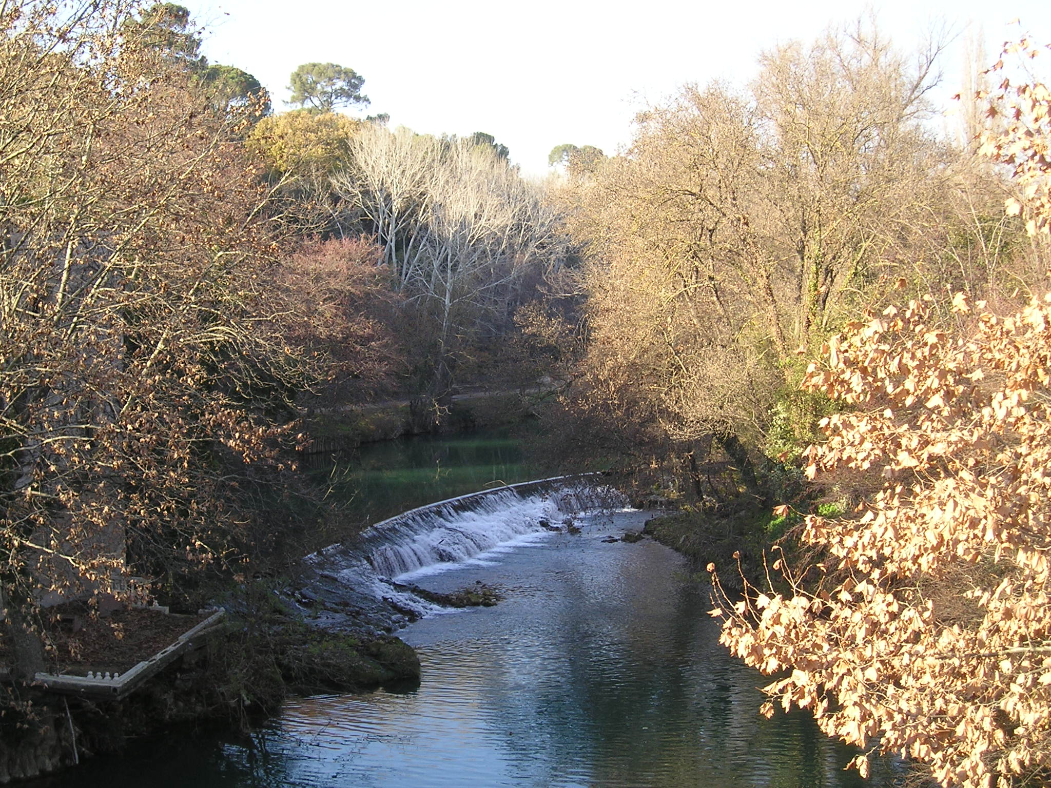 Le Lez, fleuve côtier, au nord du pont de la Concorde, entre Montpellier (à gauche) et Castelnau-le-Lez (à droite).